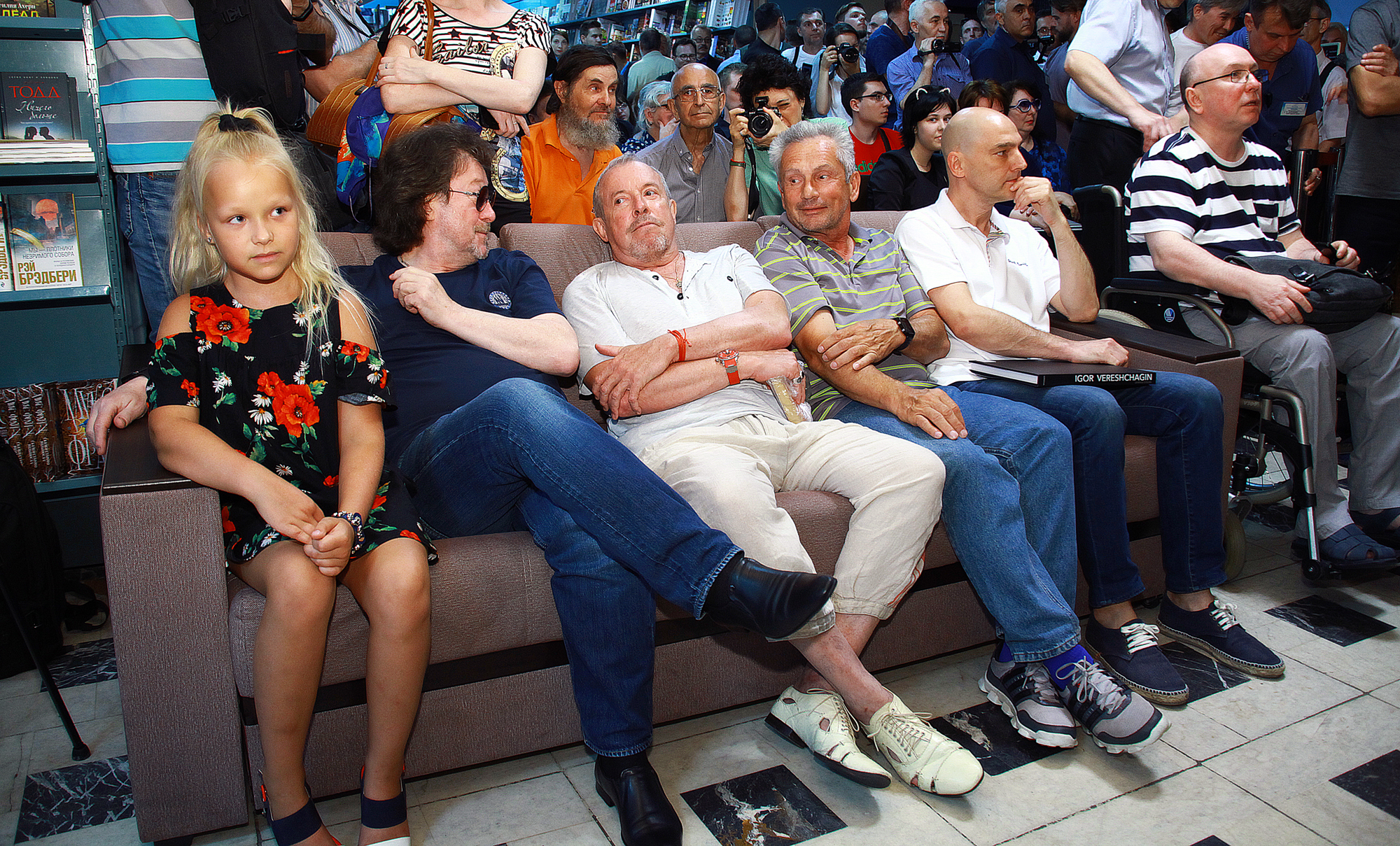 Презентация фотоальбома Игоря Верещагина